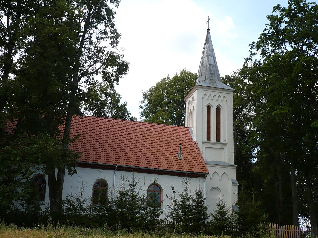 Lipaiķu luterāņu baznīca. 2008-08-10